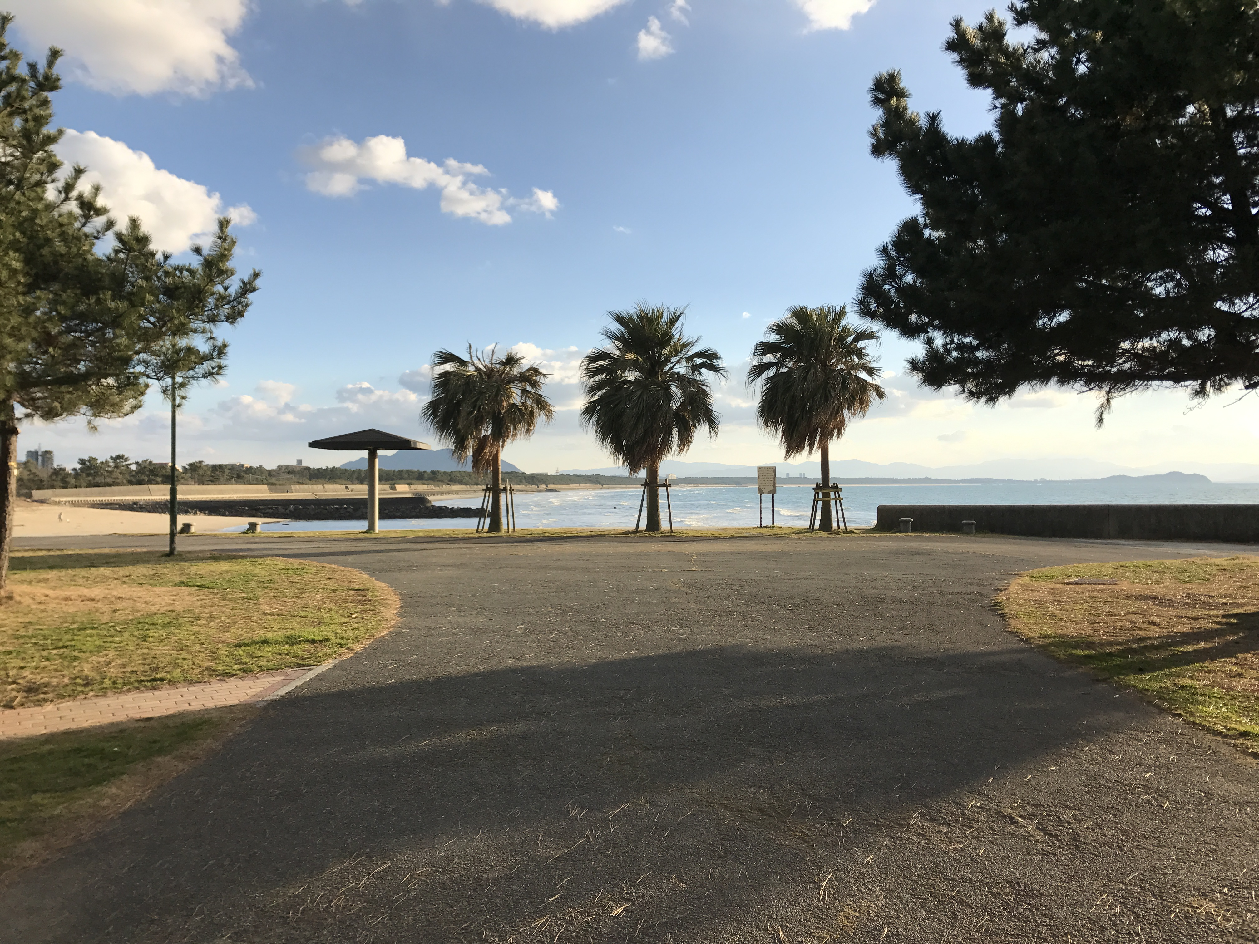 福間漁港海浜公園